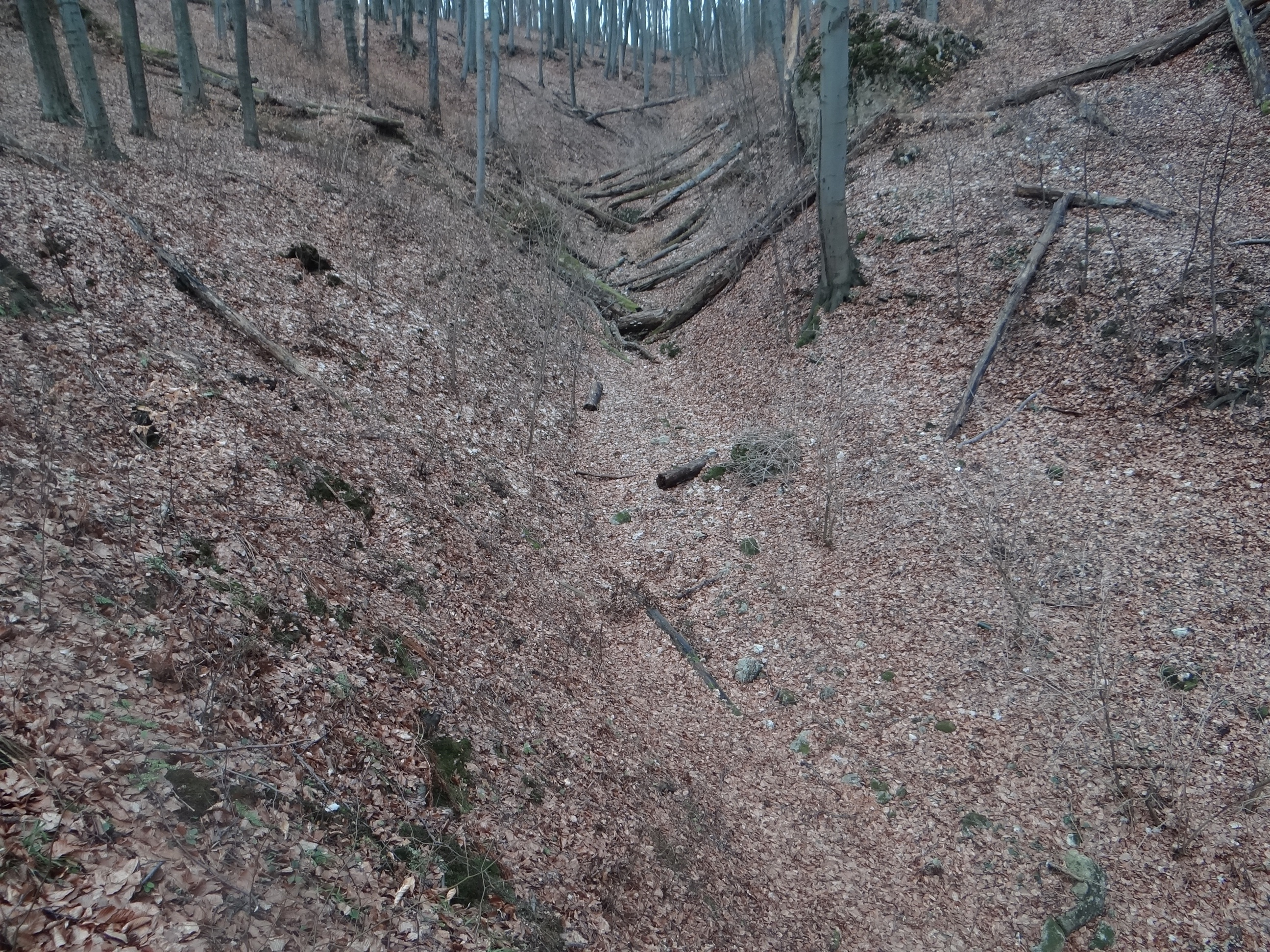 Wąwóz Żarsk